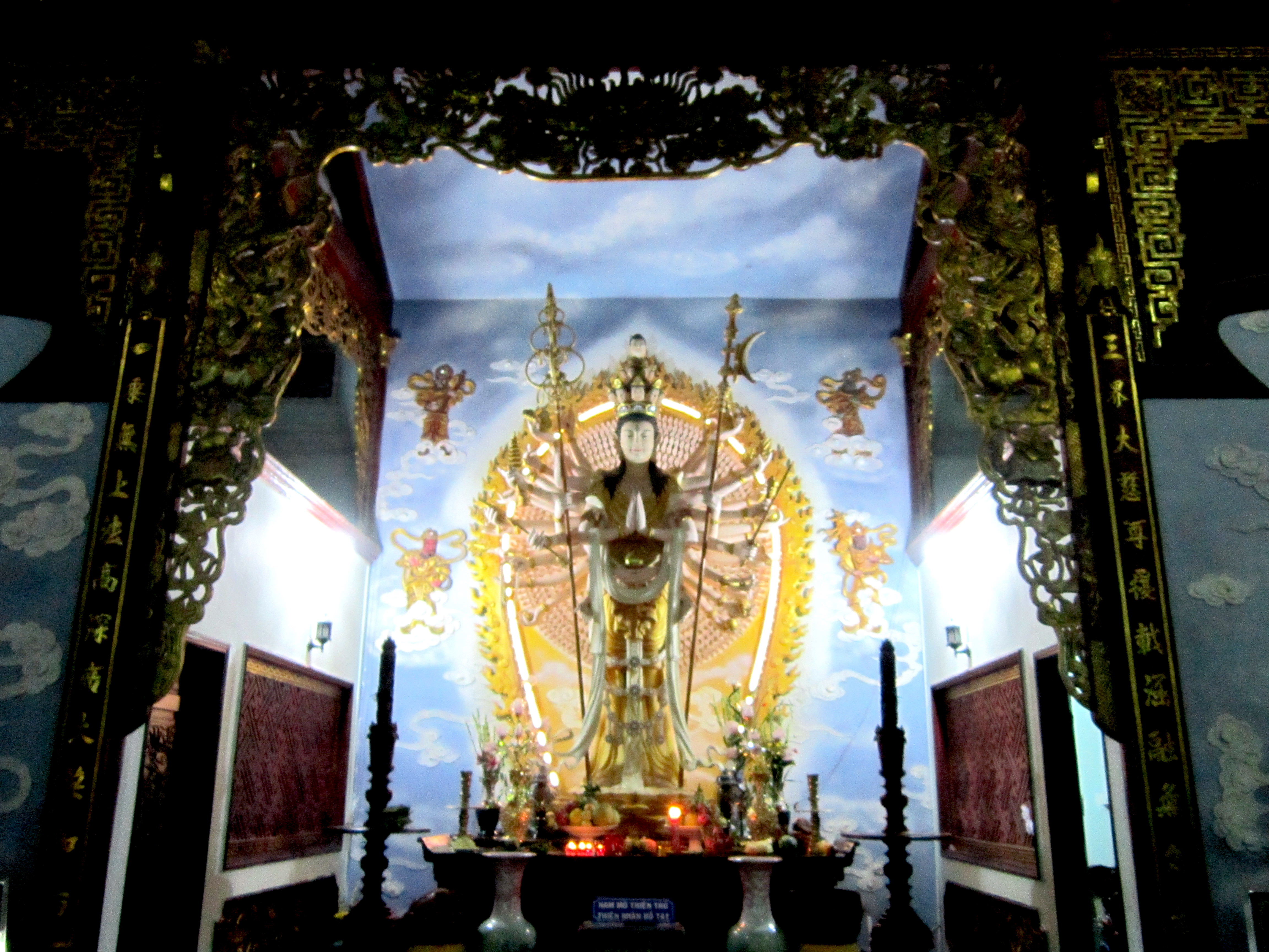 Thiên thủ Quán Âm là một trong nhiều danh xưng của Bồ-tát Quán Thế Âm. Tượng ở chùa Quan Âm Phật Đài ở phường Nhà Mát, thành phố Bạc Liêu, tỉnh Bạc Liêu (Việt Nam).